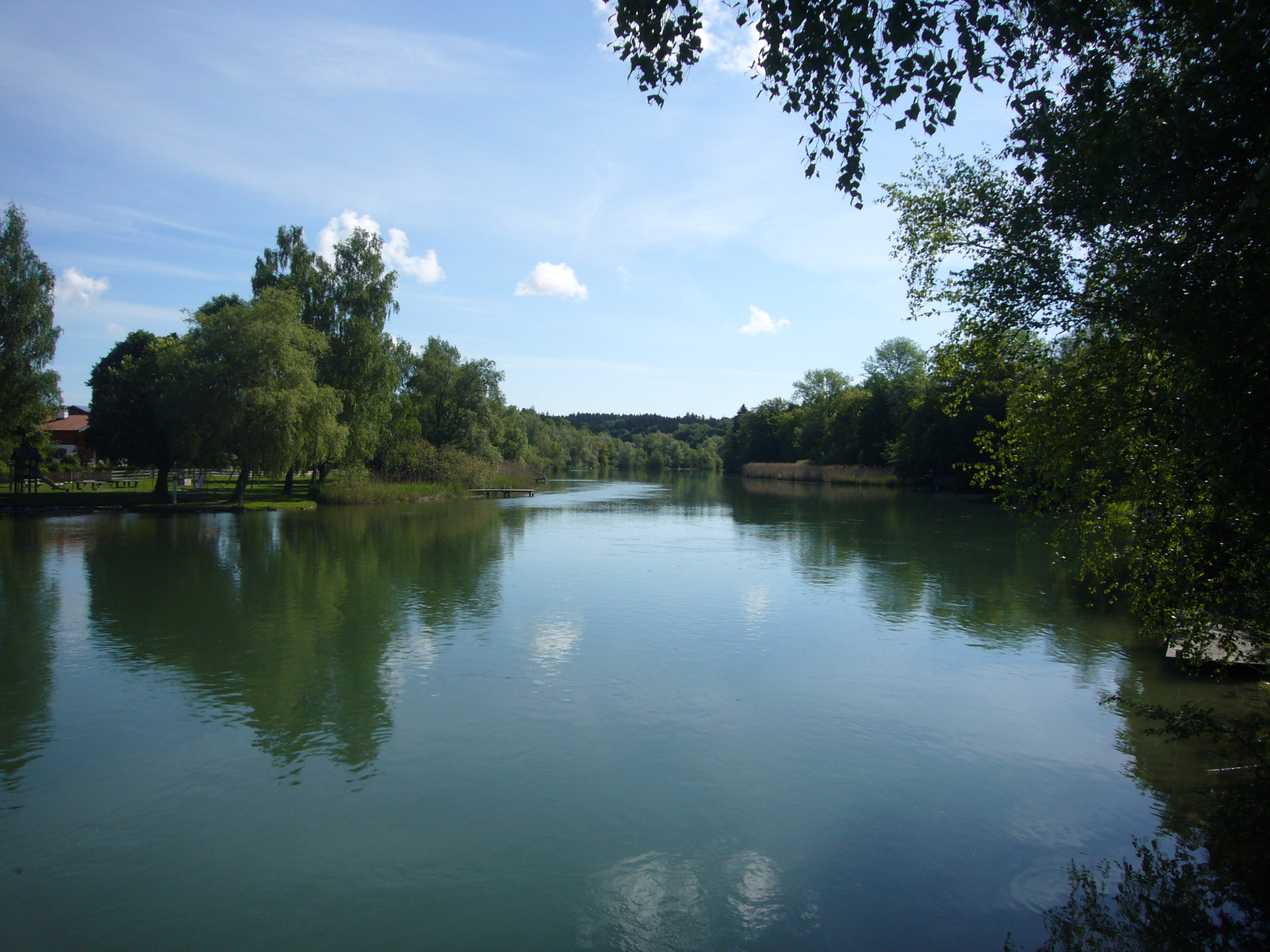 Alz in Truchtlaching